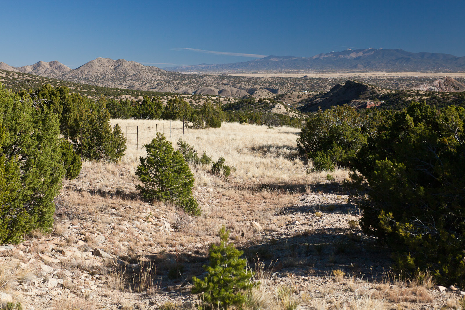 to Madrid, Cerrillos Hills and Sangre de Cristo Mtns